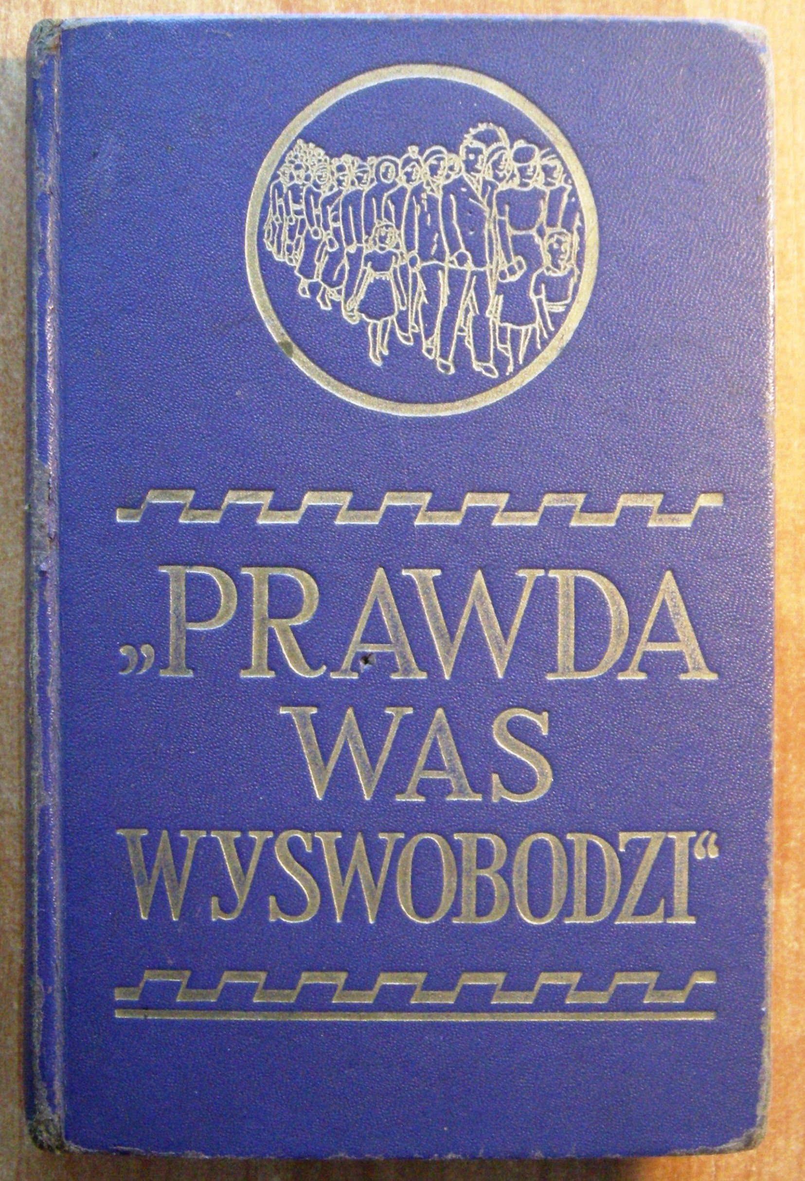 Prawda was wyswobodzi. Publikacja wydana w 1943 roku.